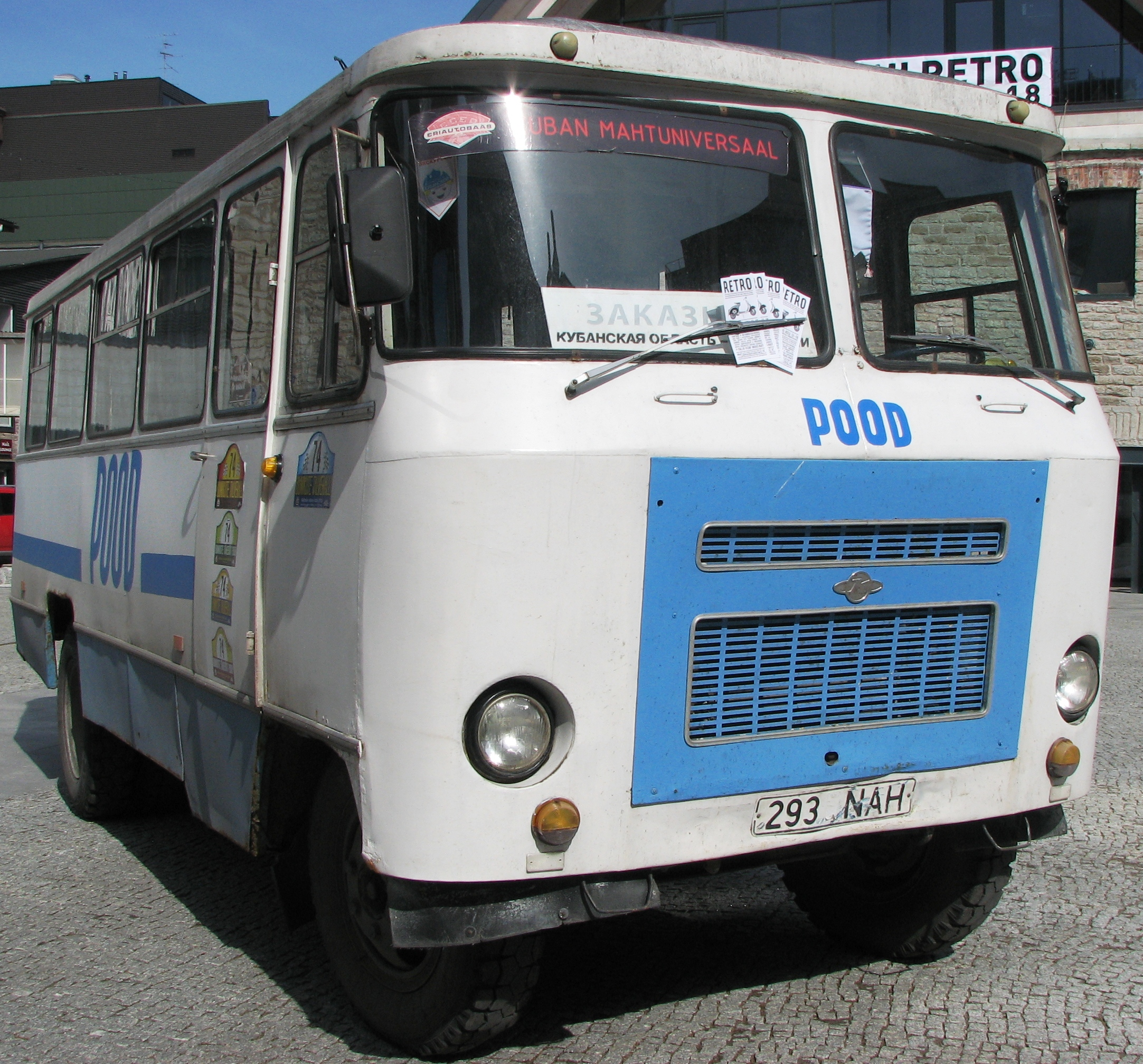 «Кубань» — автобус на базе ГАЗ, выпускаемый с 1962 года Краснодарским механическим заводом нестандартного оборудования.